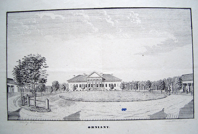 Arnionių dvaro rūmai 1848 m. Litografija pagal V.Dmochovskio piešinį